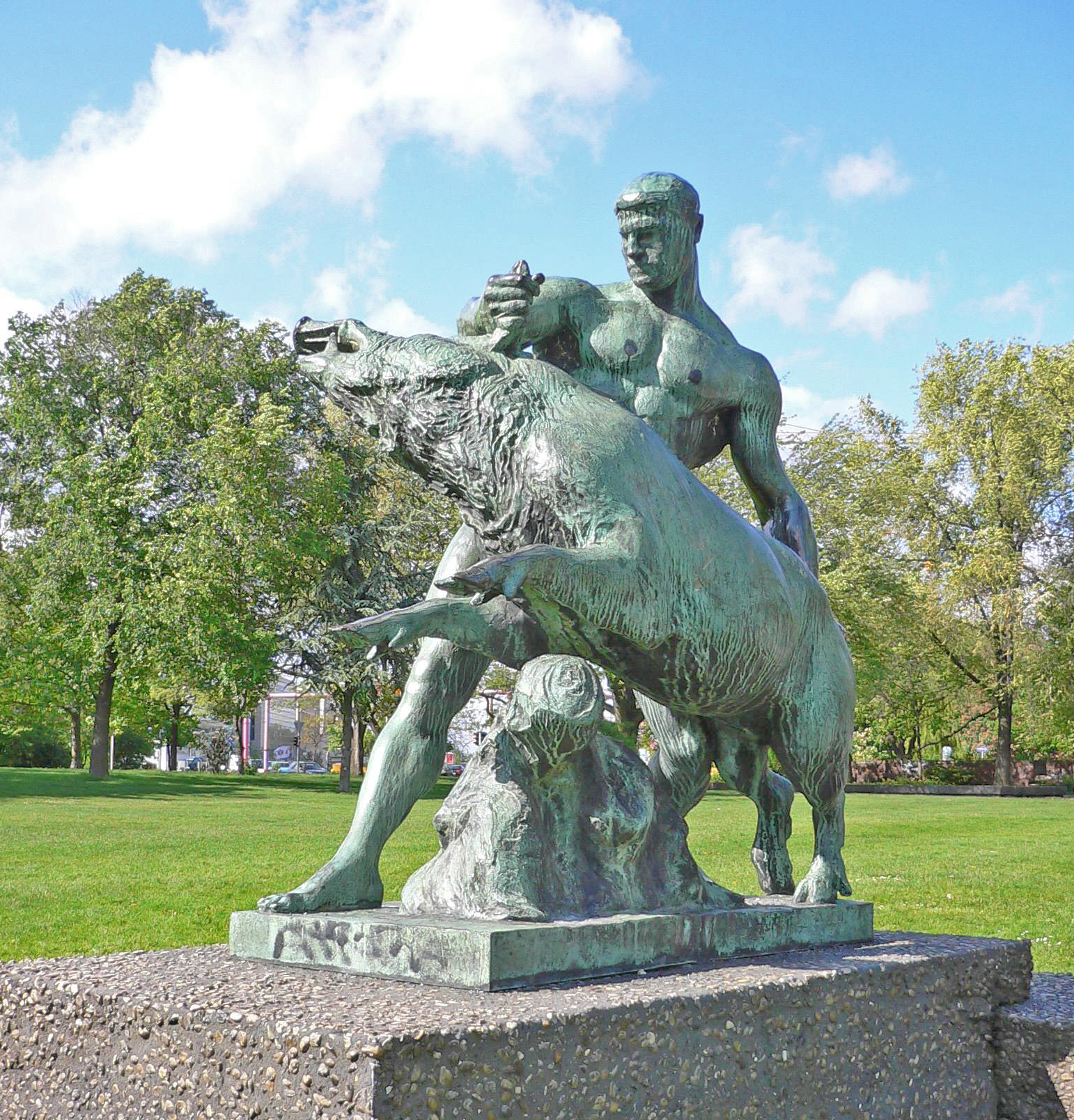 Sujet:Herakles an de Béier Source:Eege Foto vum Commons-User:Georg Slickers